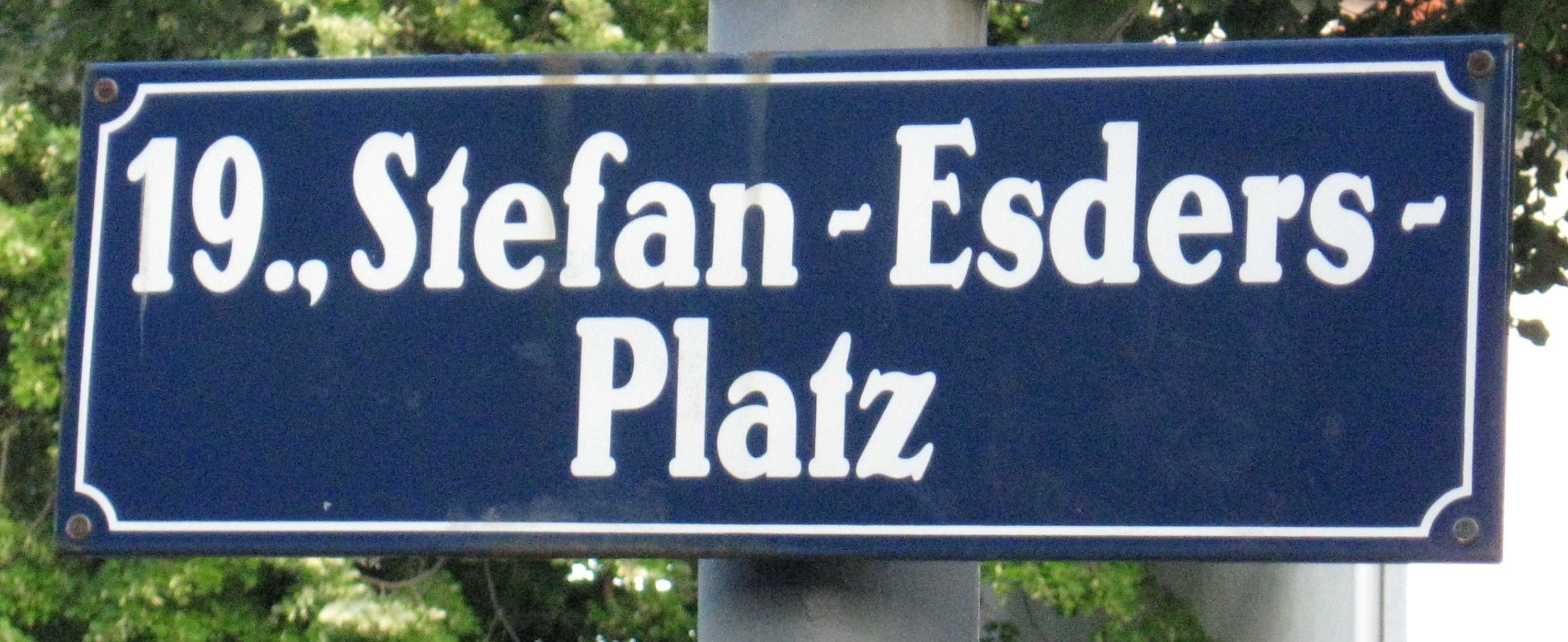 Stefan-Esders-Platz, street sign in Vienna, 19th district